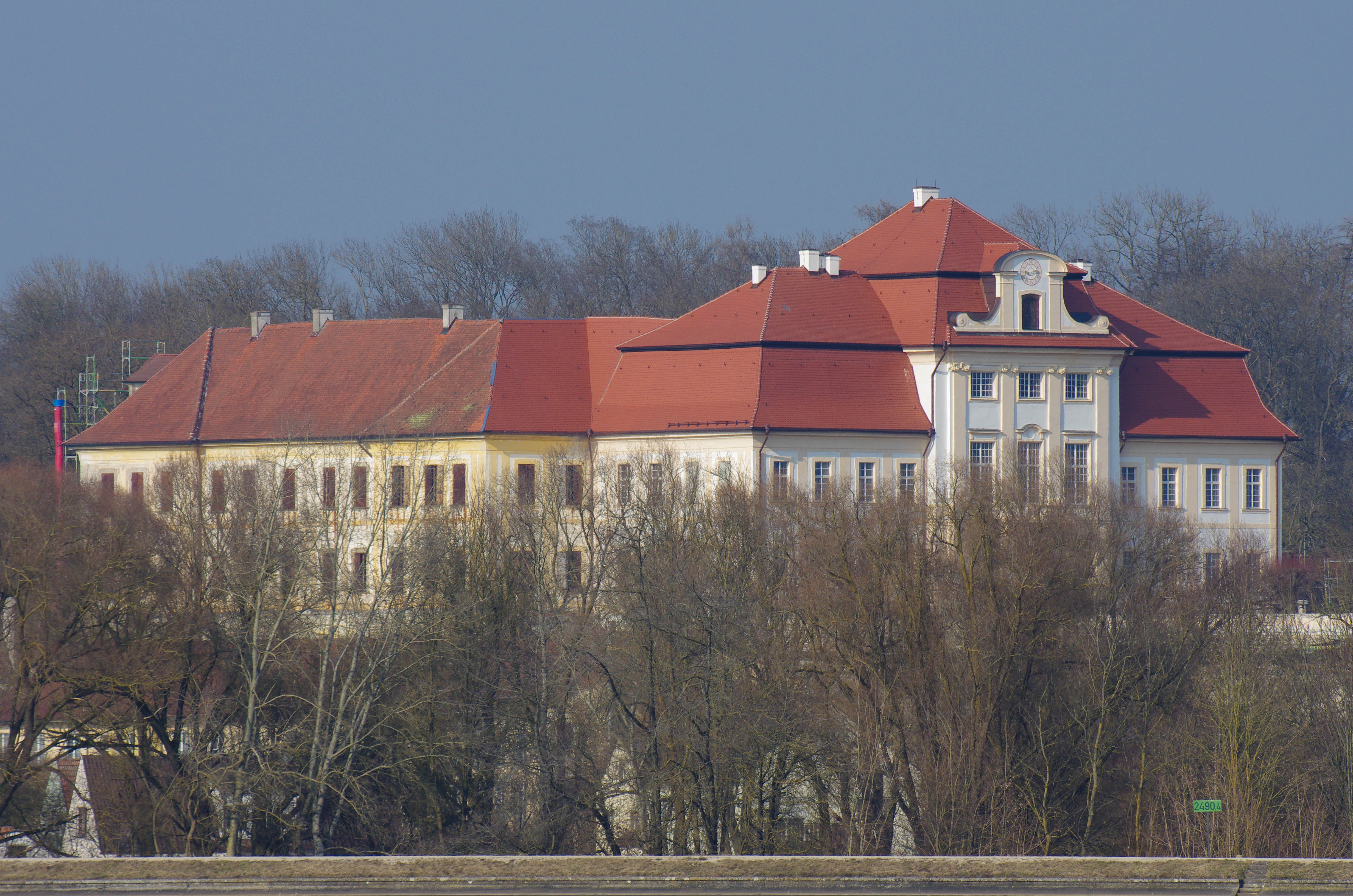 Markt Rennertshofen, OT Bertoldsheim, Schloßstraße 18 / Am Schloß 1; Barockschloß Bertoldsheim; hier: Ansicht von Südwesten, vom Südofer der Bertoldsheimer Staustufe herThis is a photograph of an architectural monument.